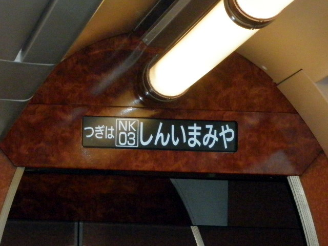 リニューアル車に新たに付いたLCD式車内案内表示機